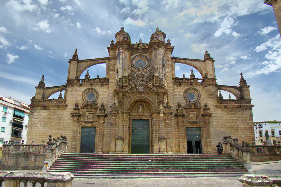 Catedral de Jerez de la Frontera, Andalucía, España.